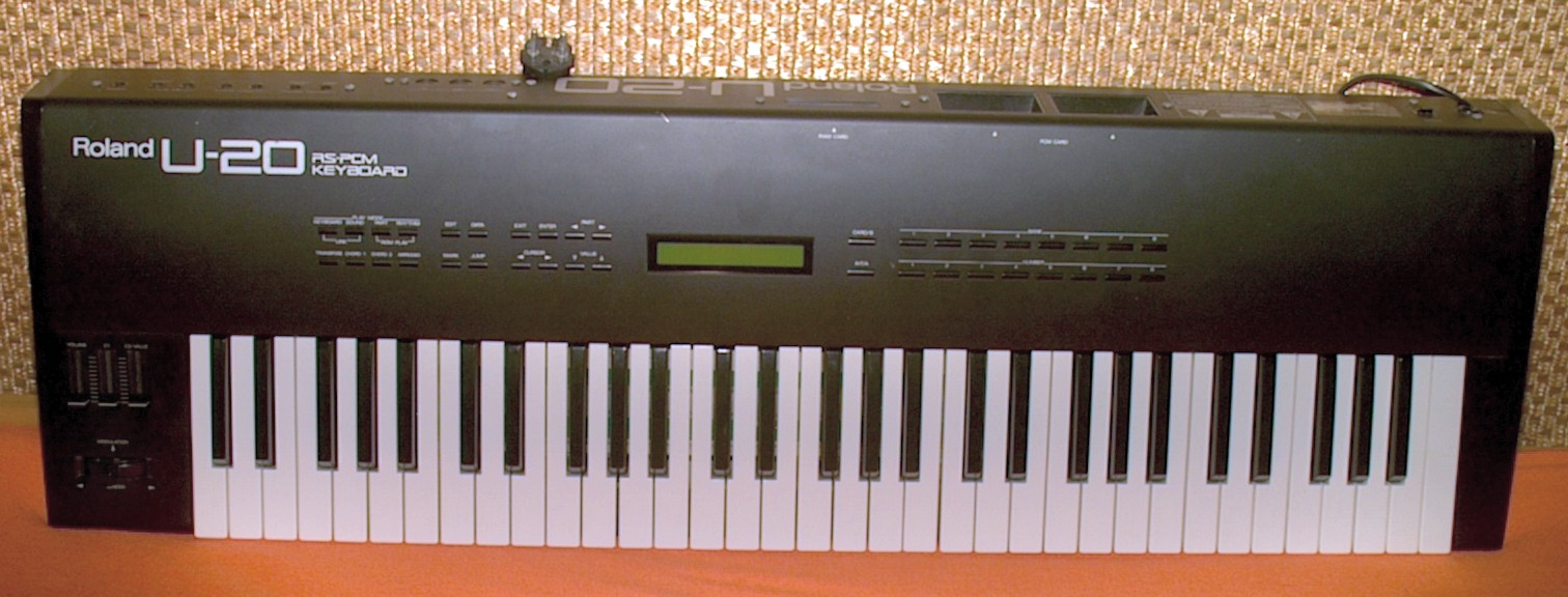 Roland U-20 RS-PCM keyboard